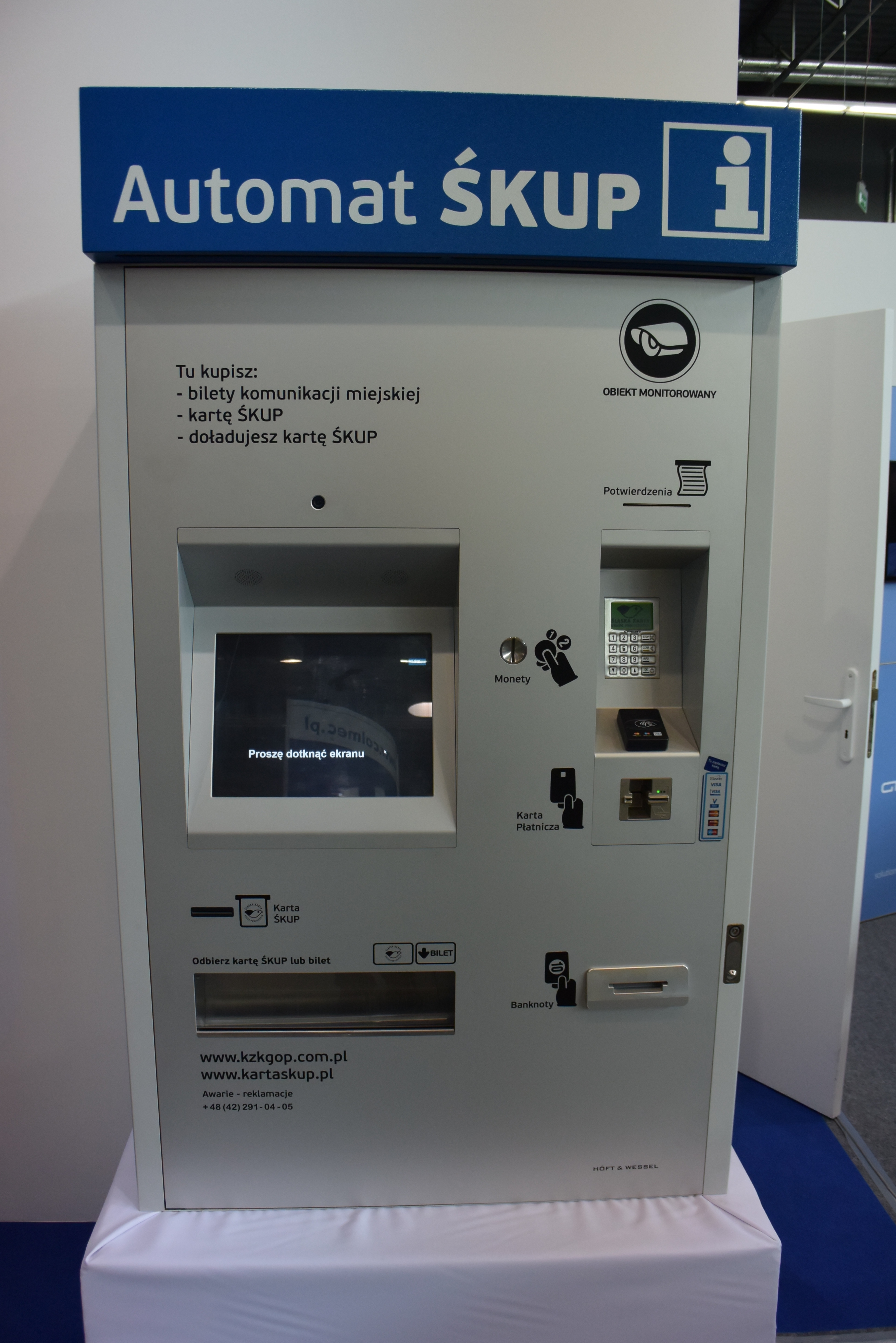 Biletomat Śląskiej Karty Usług Publicznych, Transexpo 2014, Kielce